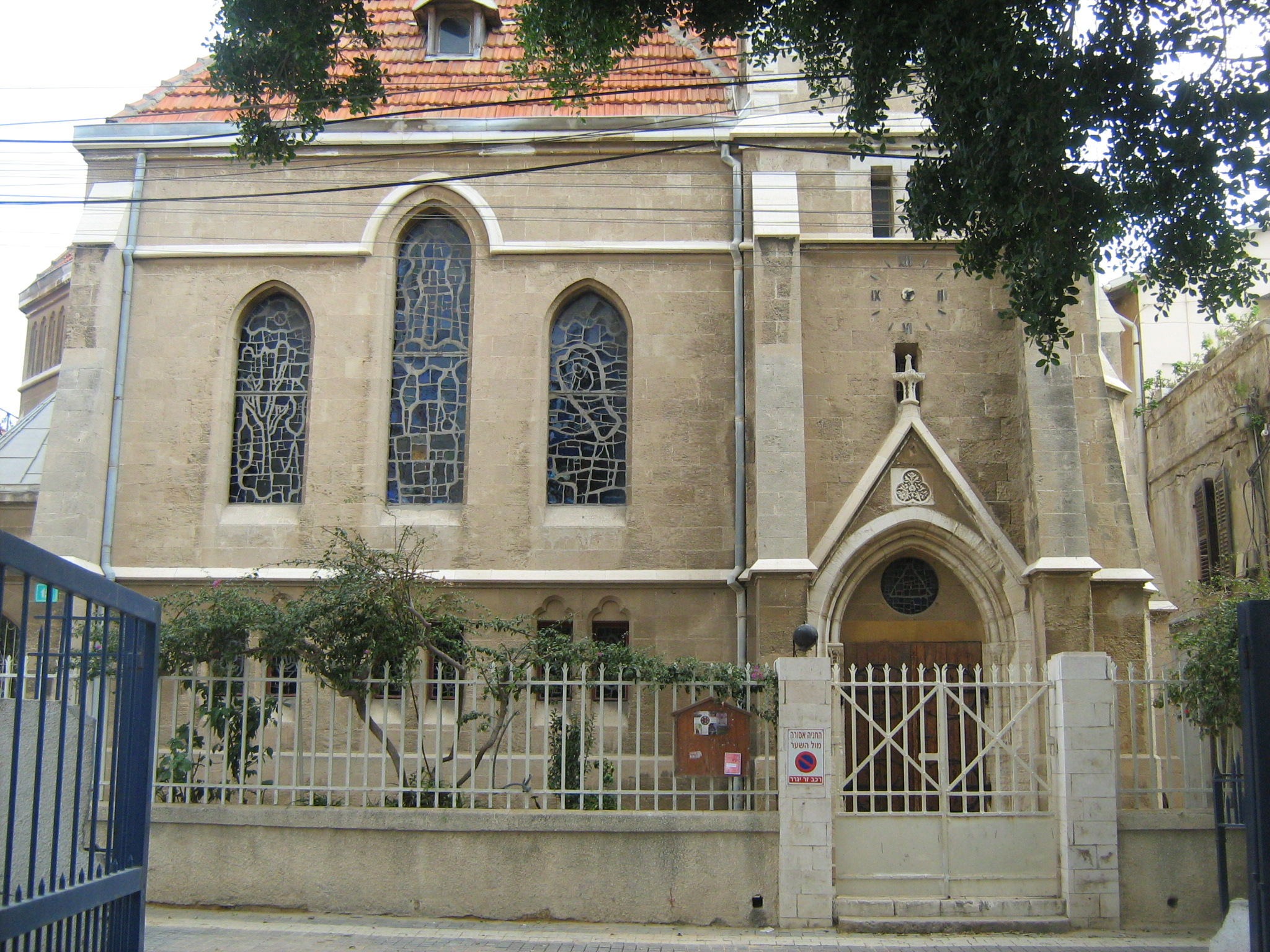 המושבה האמריקאית ביפו